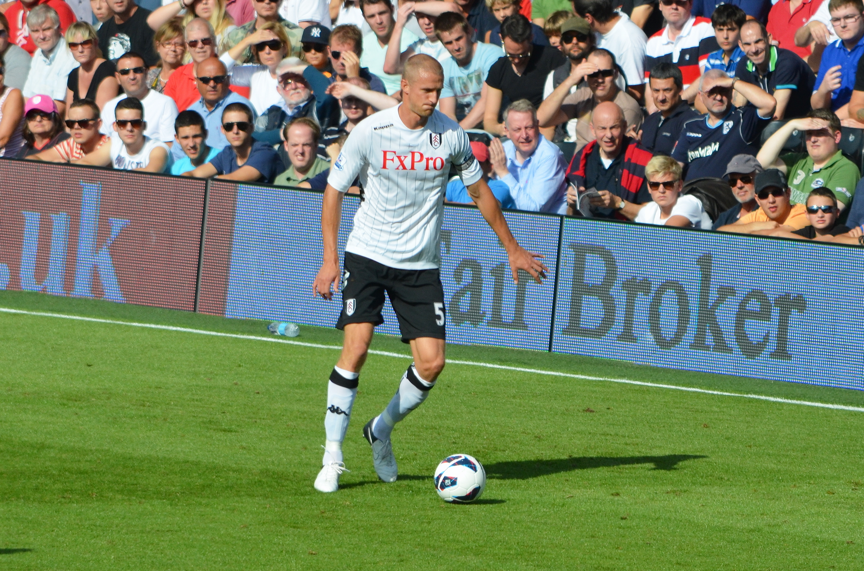 Brede Hangerland